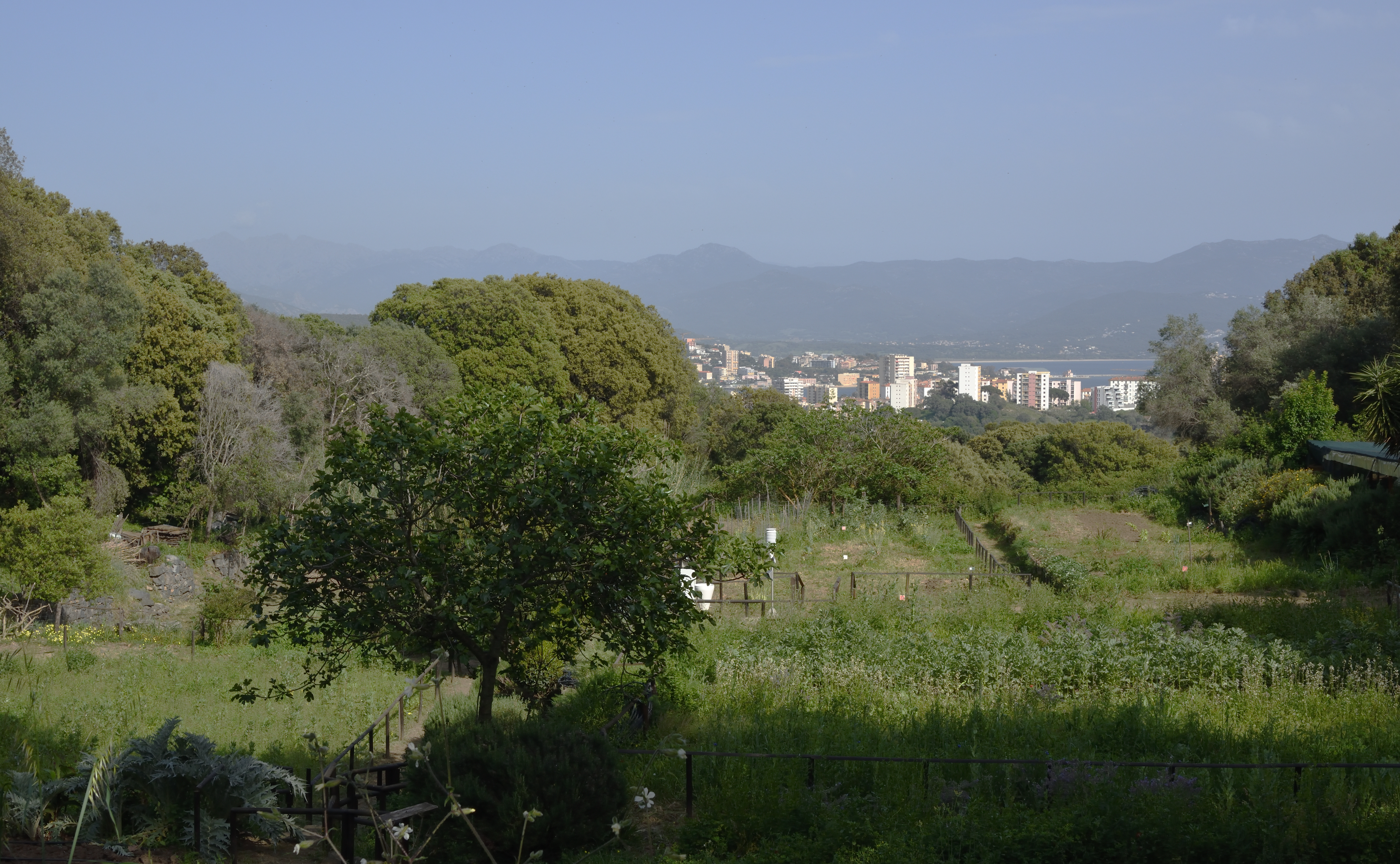 Ajaccio, jardin potager dans la domaine des Milelli